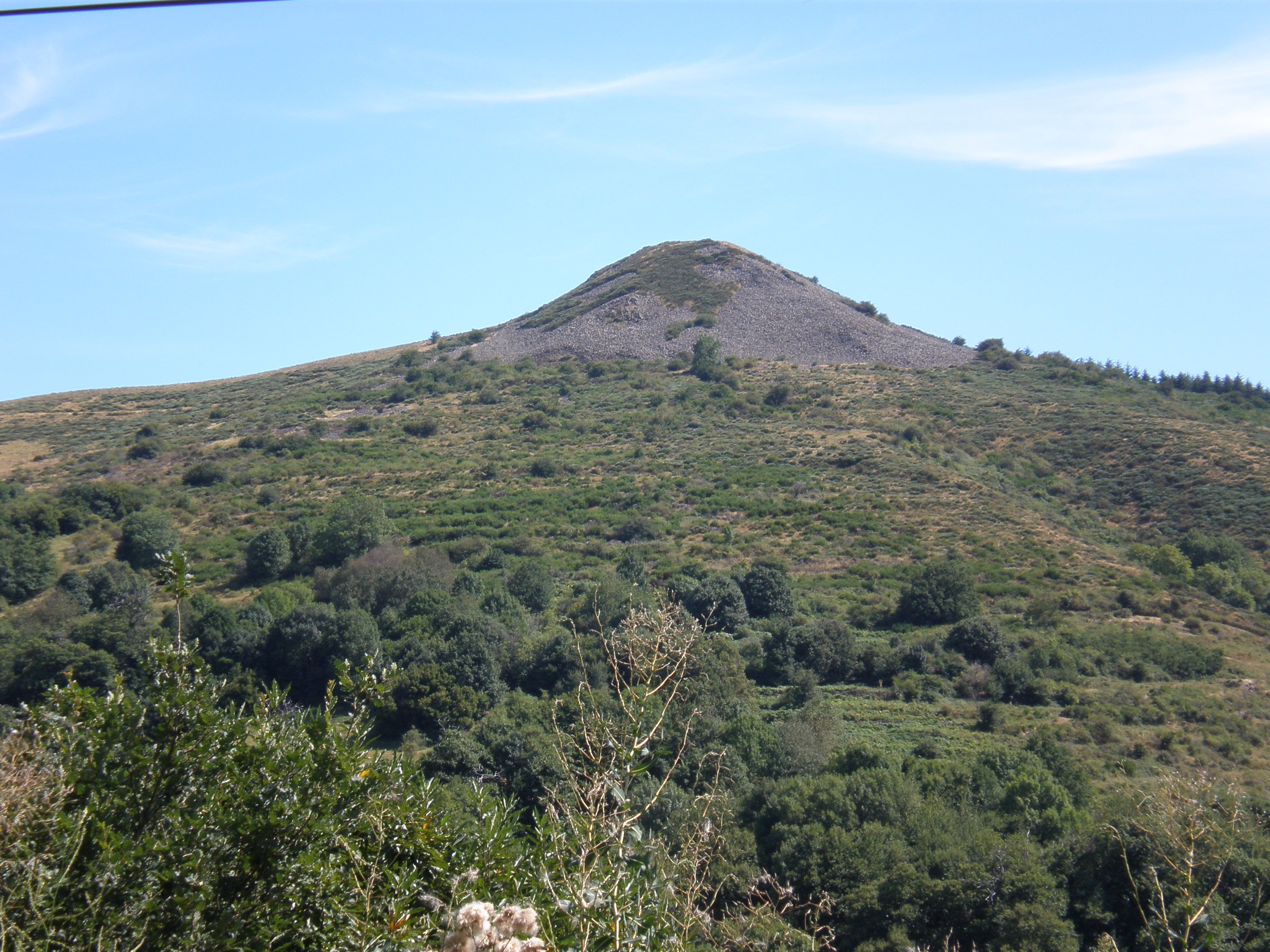 Le rocher de Gourdon (Ardèche)